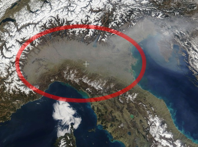 Val padana Non va confusa con la valle Po, la valle del fiume Po, in provincia di Cuneo, che immette il Po in pianura padana.